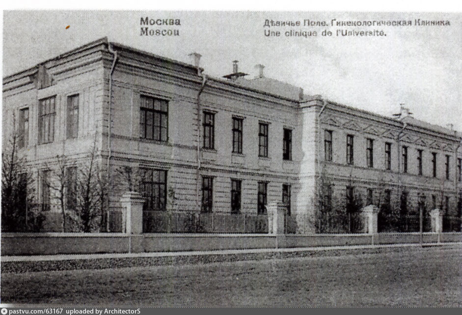 Гинекологическая клиника занимала левое крыло здания, построенного на средства Тимофея Саввича Морозова в 1889 году.